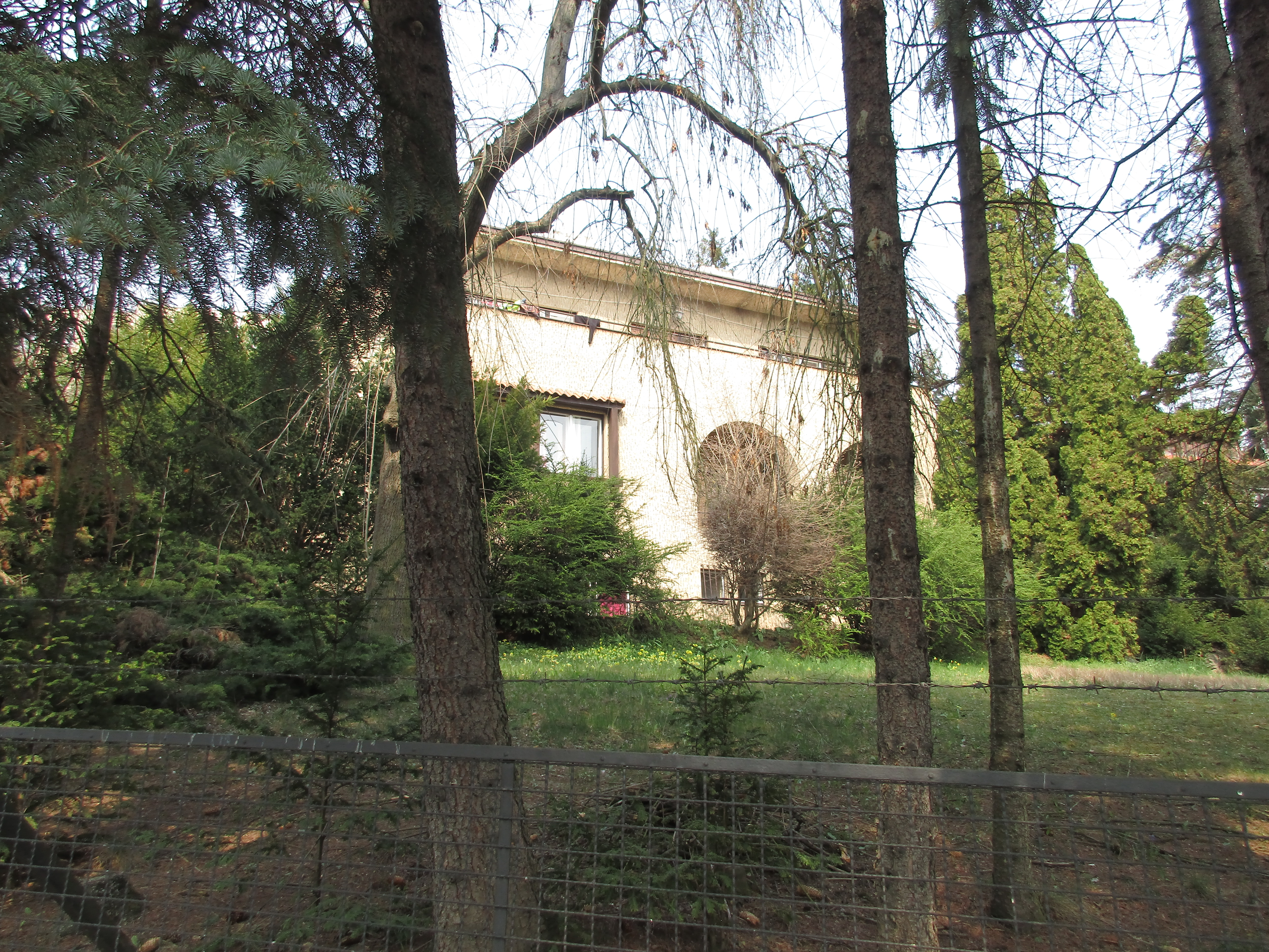 Filmařská 433/2, Praha 5-Hlubočepy